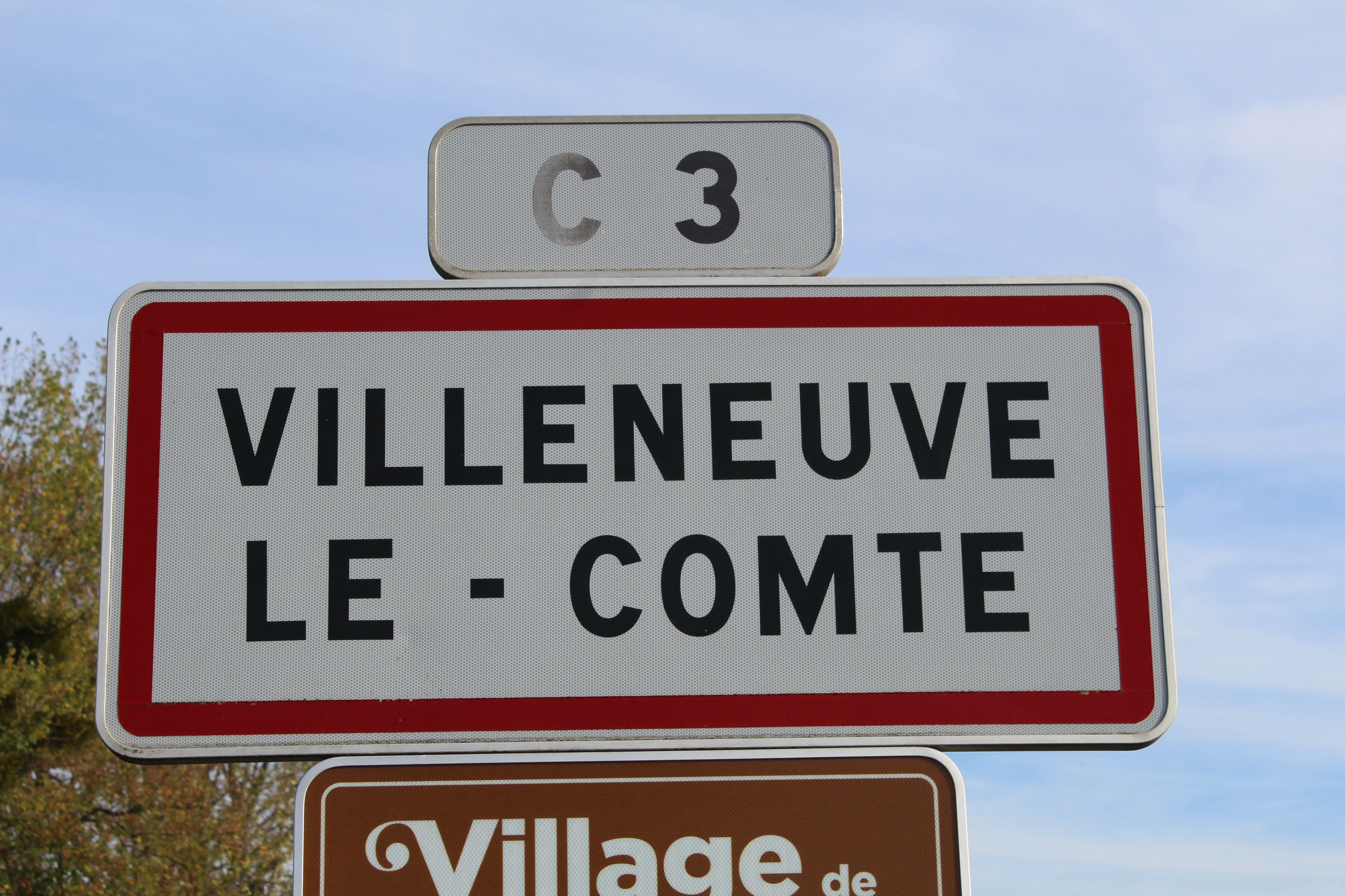 Panneau d'entrée de Villeneuve-le-Comte.